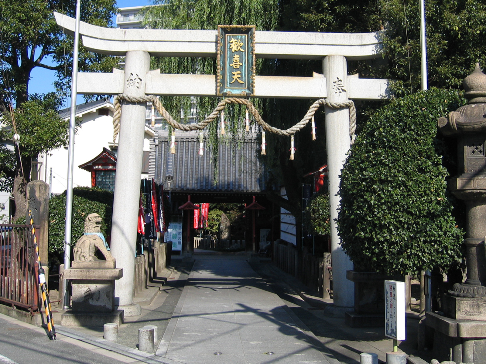 了徳院